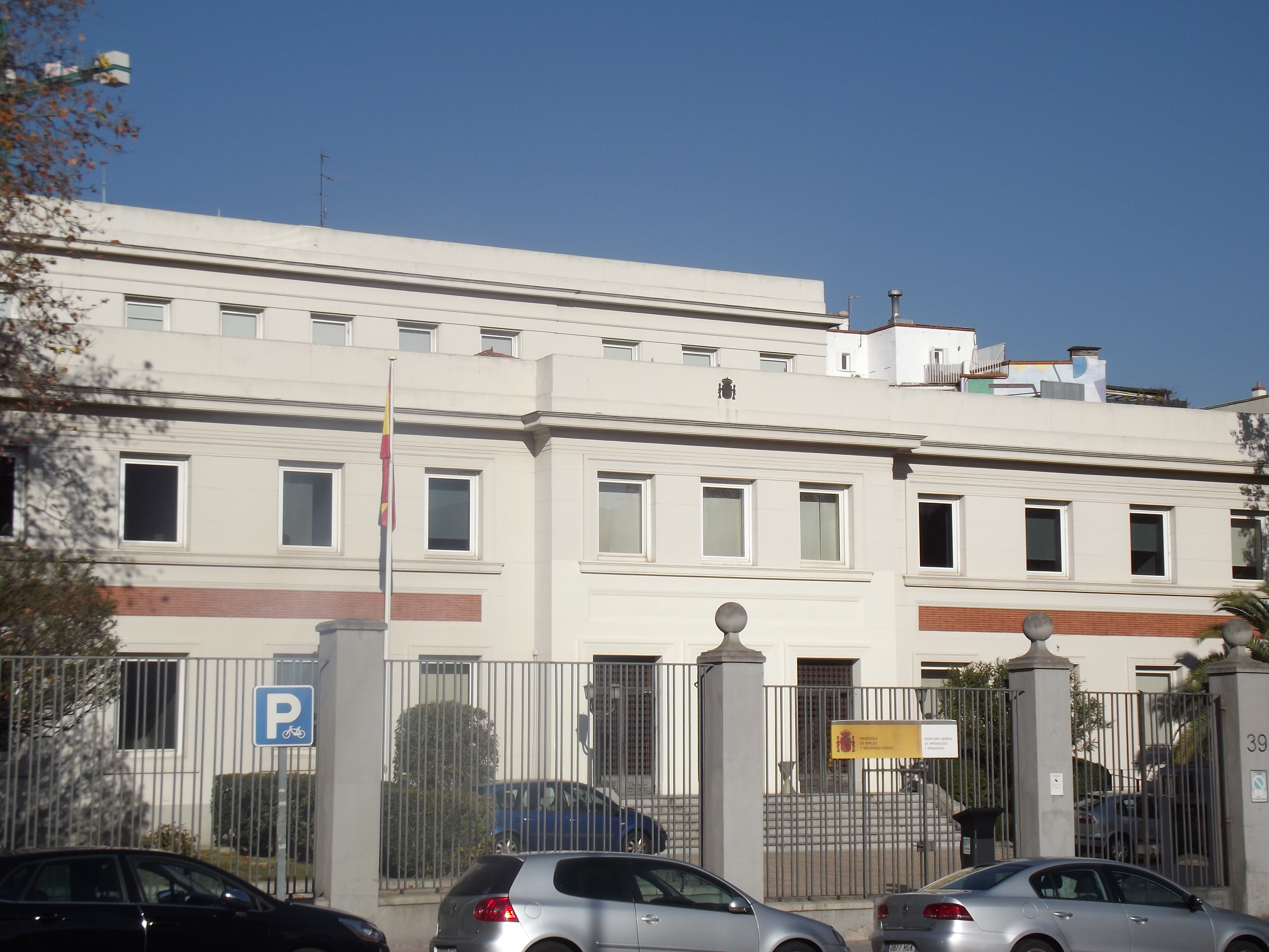 Antiguo Instituto Nacional de Asistencia Social, Madrid.